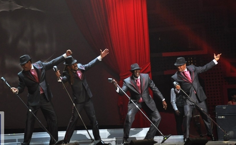 Presentación de Fernando Villalona, Toño Rosario, Eddy Herrera y Johnny Ventura en los Premios Casandra 2011.